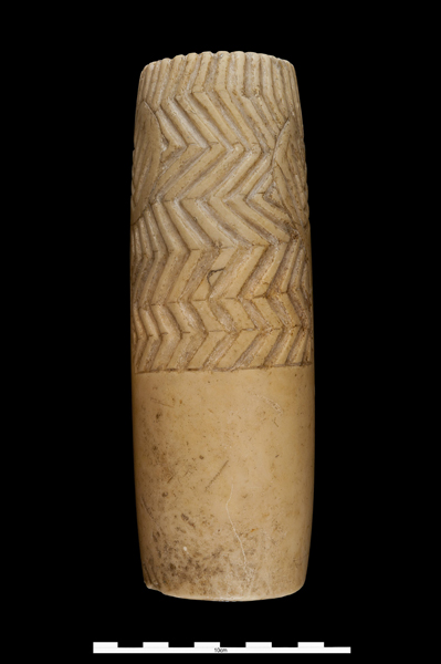 Ídolo de Extremadura (Calcolítico). Número de inventario: 20572.